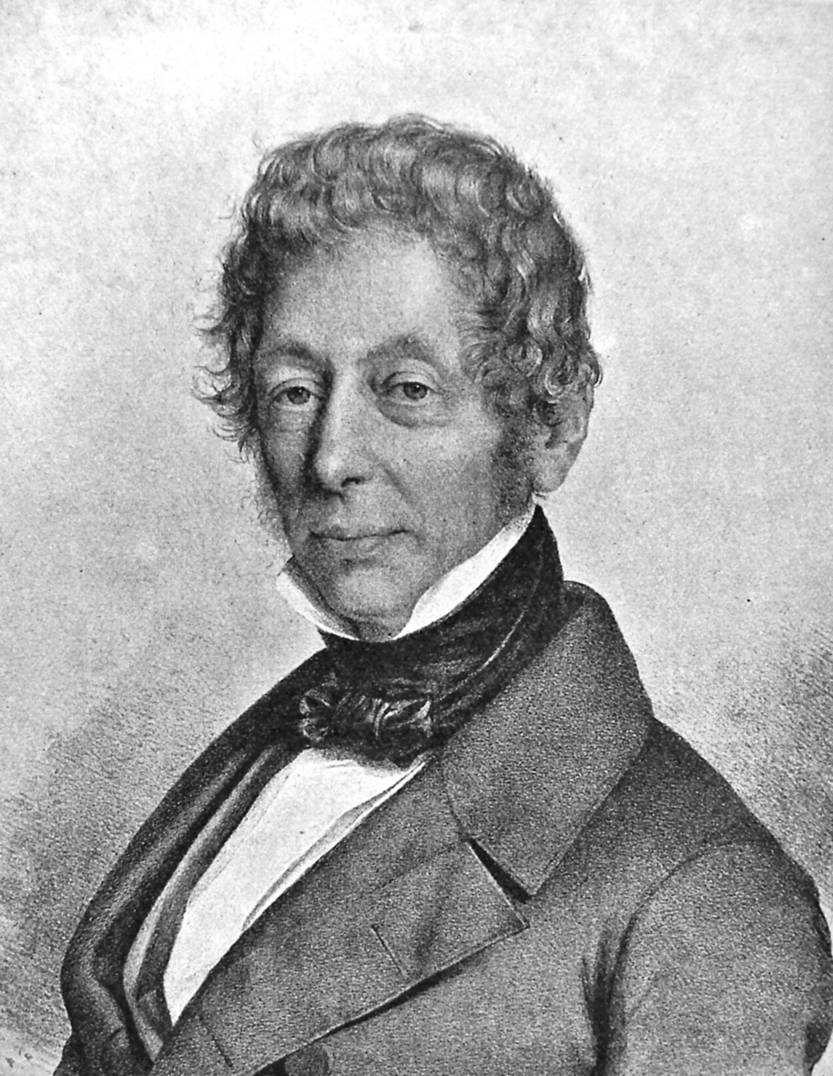 Johannes Carsten Hauch (12. maj 1790 - 4. marts 1872) var en dansk digter og romanforfatter.